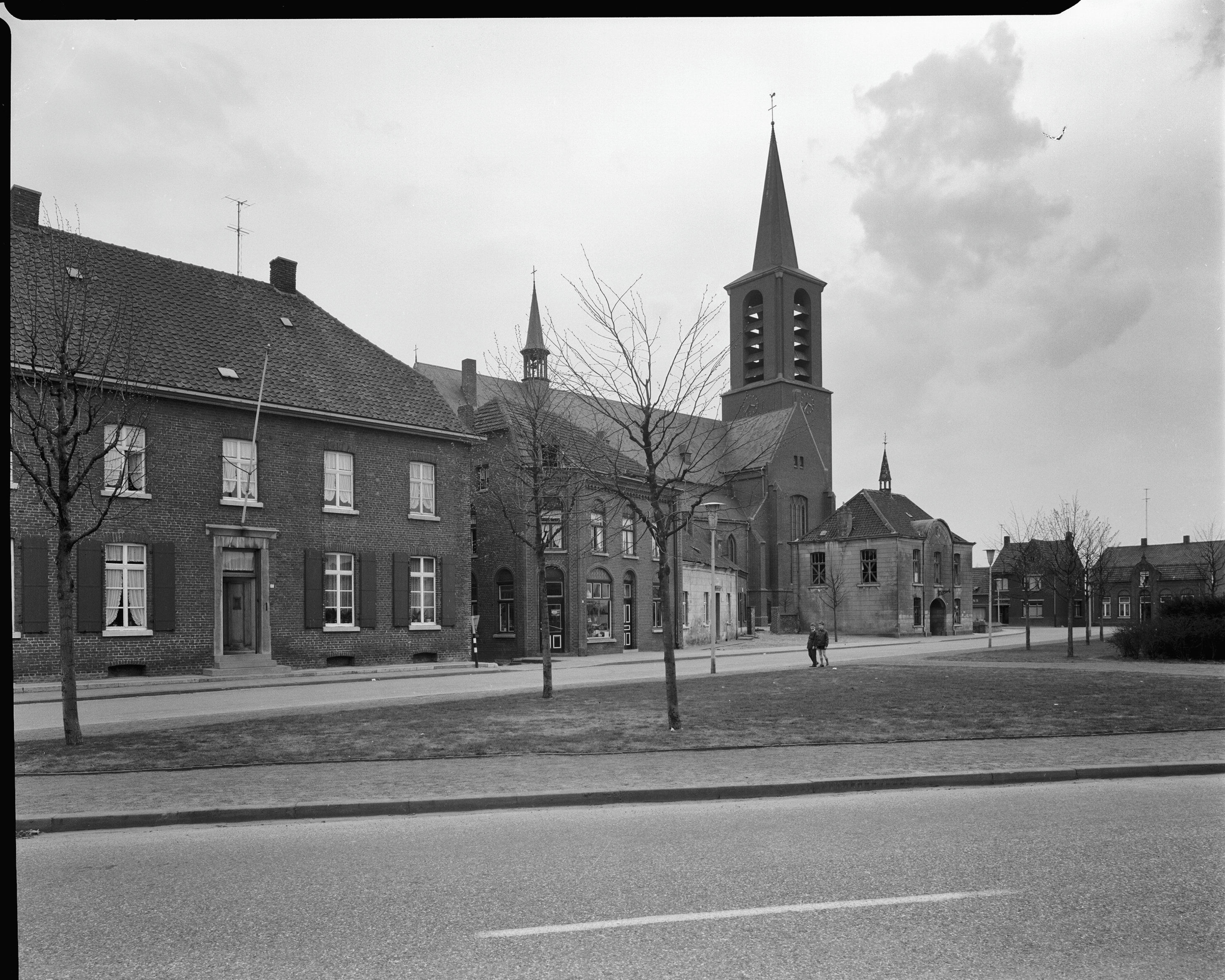 Voormalig Raadhuis: voormalige Raadhuis met omgeving